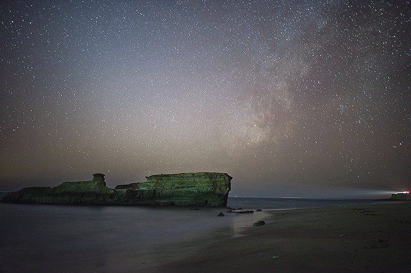 بندر تنگ سیستان و بلوچستان بندر تنگ بخش کوچکی است در شهر چابهار که به دلیل تلاقی کویر و دریا در این منطقه جذابیت های ویژه ای به وجود آمده که جلوه ی بی نظیری را به این روستا بخشیده است. شهرستان کنارک که در جنوب شرقی ایران و در سواحل زیبای دریای عمان قرار گرفته است، از دیرباز با اسکله صیادی بزرگ و فعالش یاد می‌شود. جاذبه های طبیعی بکر و بی نظیری در این بخش کوچک بندری وجود دارد دل هر گردشگری را می برد.سواحل شنی و ماسه ای و صخره ای وجود درخت انجیر معابد و تپه های گل افشان از جاذبه های این بندر بی نظیر است.